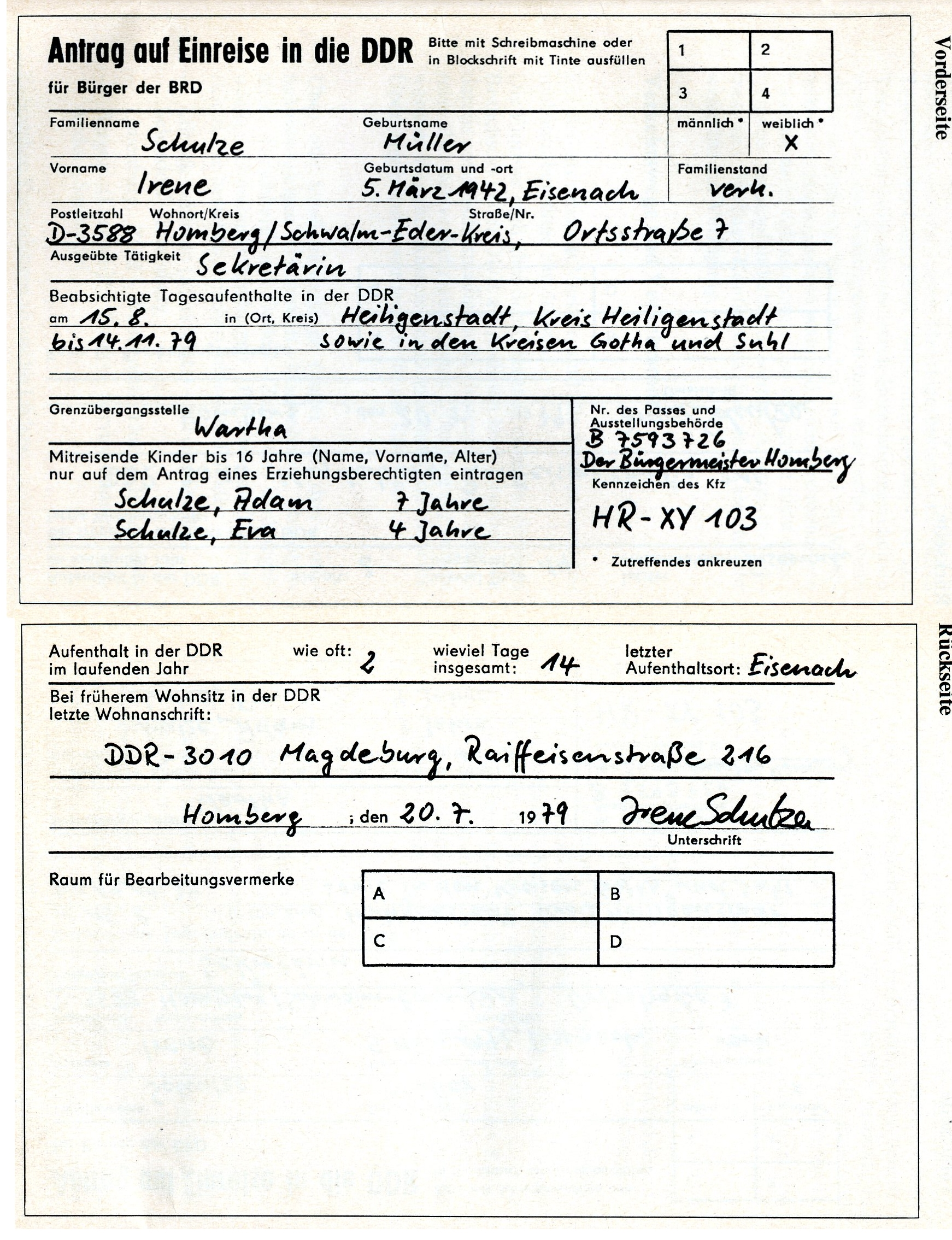 Muster eines Antragsformulars zur Erteilung eines Mehrfach-Berechtigungsscheines, der zur Einreise in den grenznahen Bereich der DDR benötigt wurde.